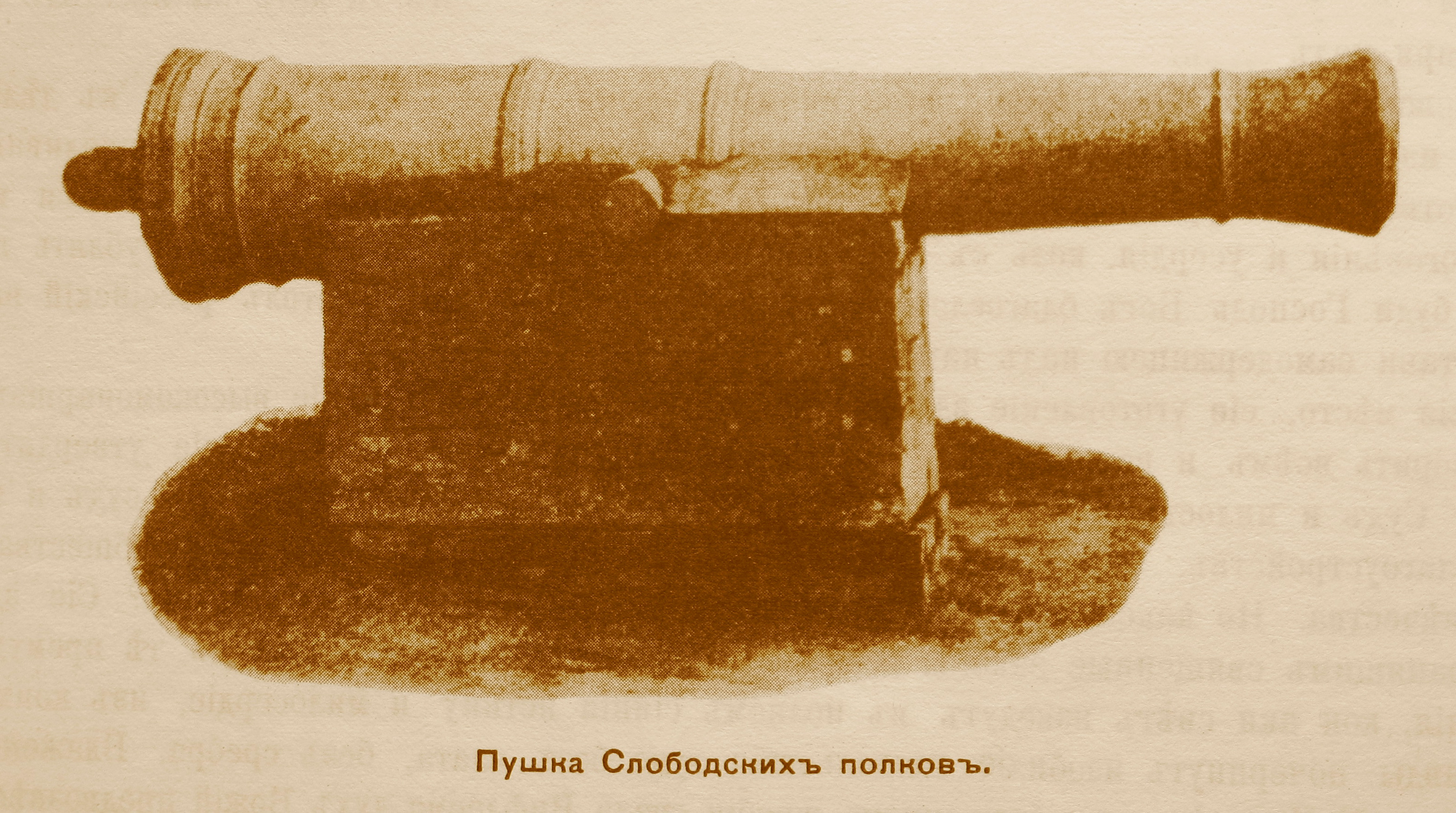 Пушка Слободских полков (вторая половина 17 века). В 20 веке находилась перед Историческим музеем Харькова. Репродукция из книги "История города Харькова за 250 лет его существования" Миллера и Багалея, том 1 (1904/1905).